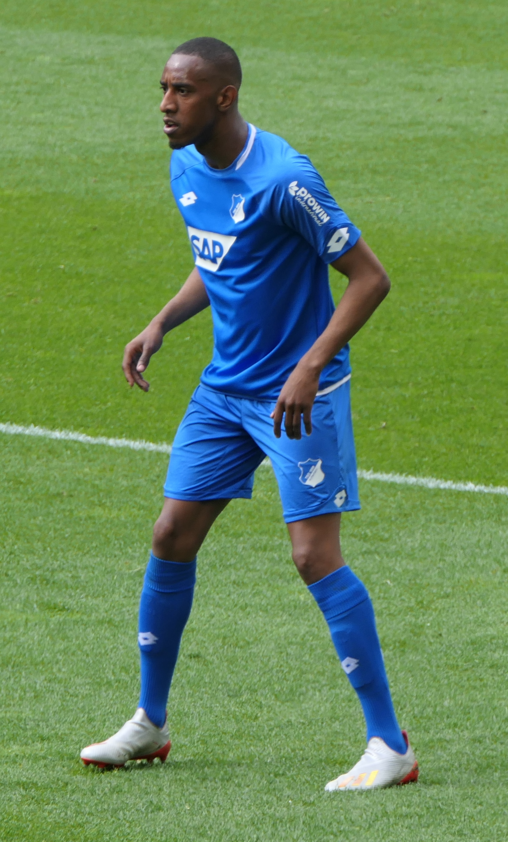 Der Fussballprofi Joshua Brenet im Trikot der TSG 1899 Hoffenheim beim Heimspiel gegen den SV Werder Bremen am 11.05.2019.